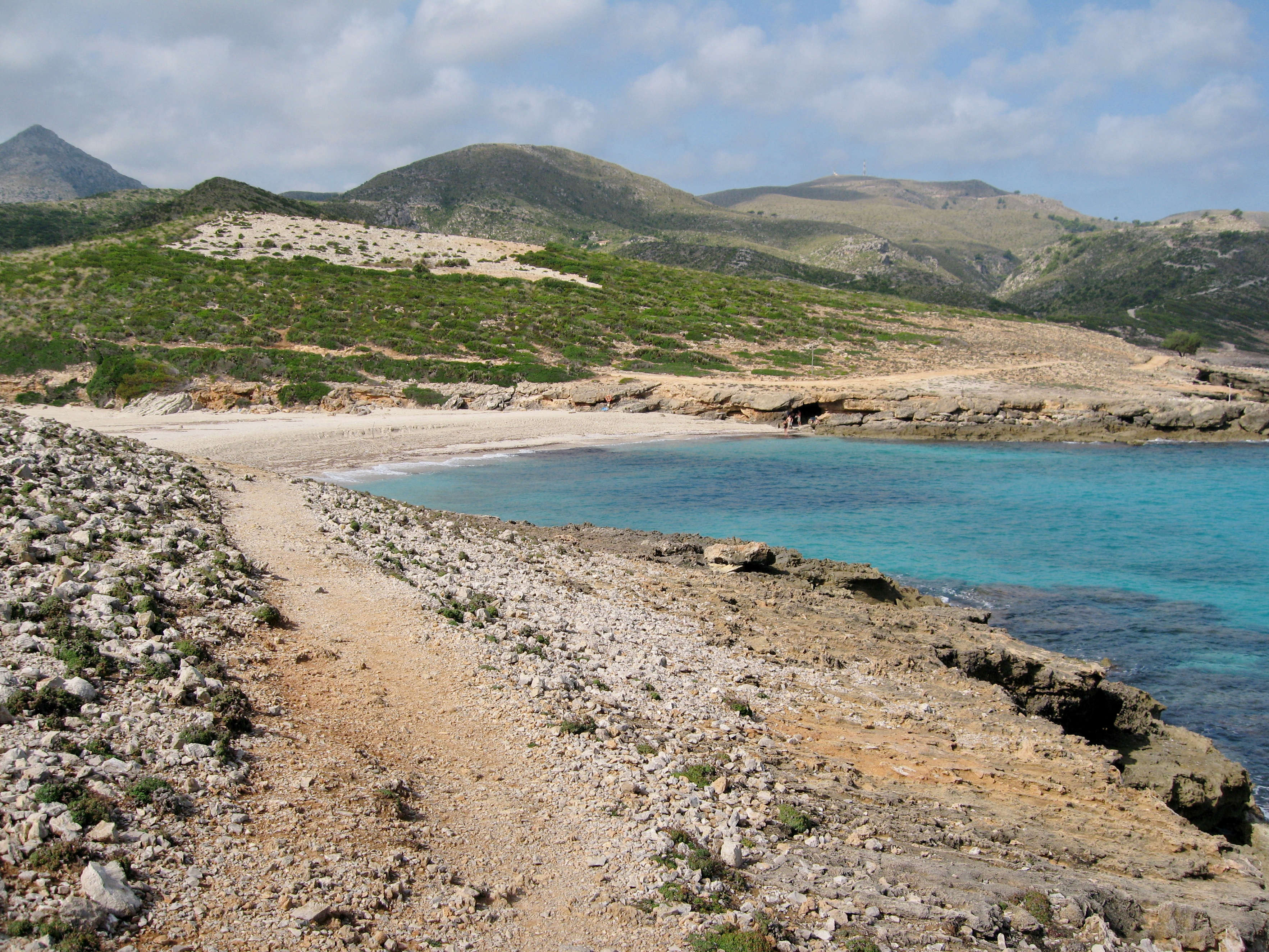 Sa Font Celada, Artà, Mallorca, Spain